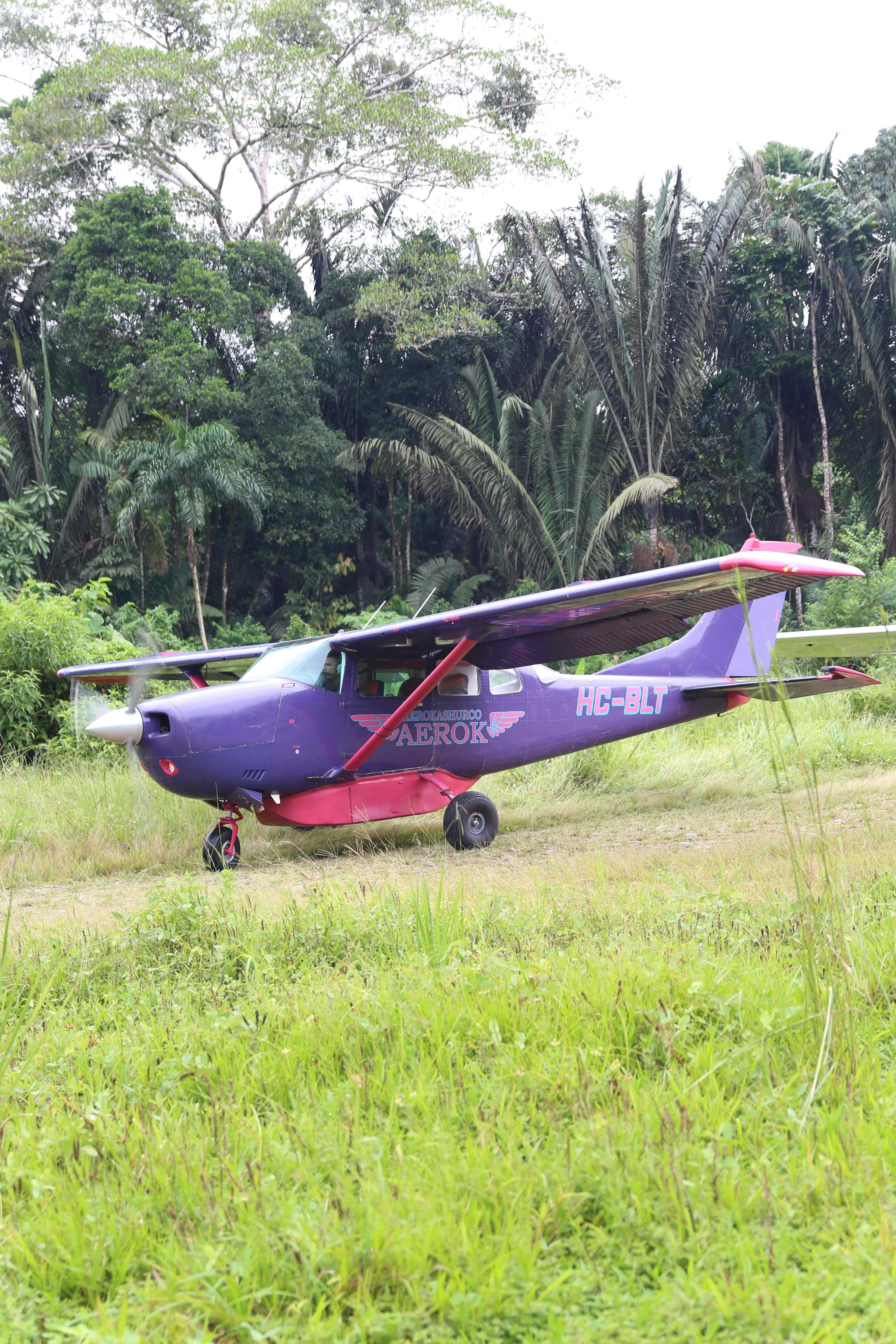 Capitán Israel Viteri Gualinga, el primer piloto Kichwa en una avioneta Cesna 206 de la Compañía AeroKashuro, en la pista de Sarayacu, antes del despegue para recoger pasajeros de otra comunidad en su último vuelo donde se accidentó y falleció ese mismo día del 15 de febrero de 2020.